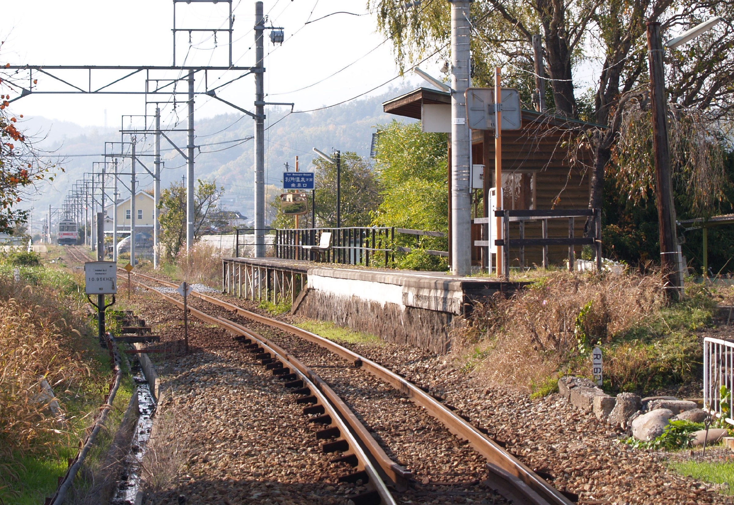 中野駅